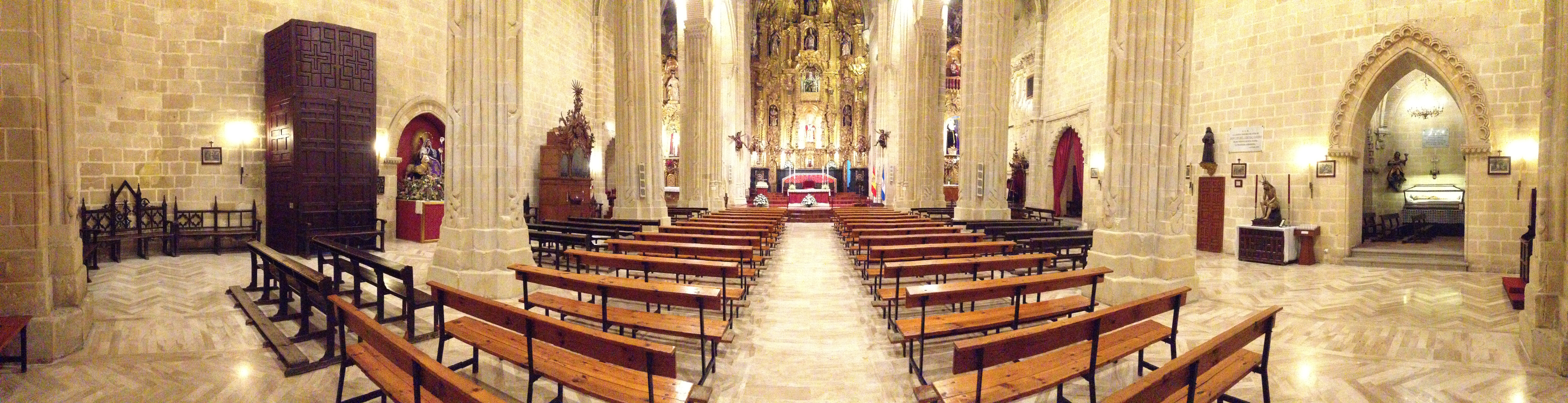 Interior panoramica San Dionsio